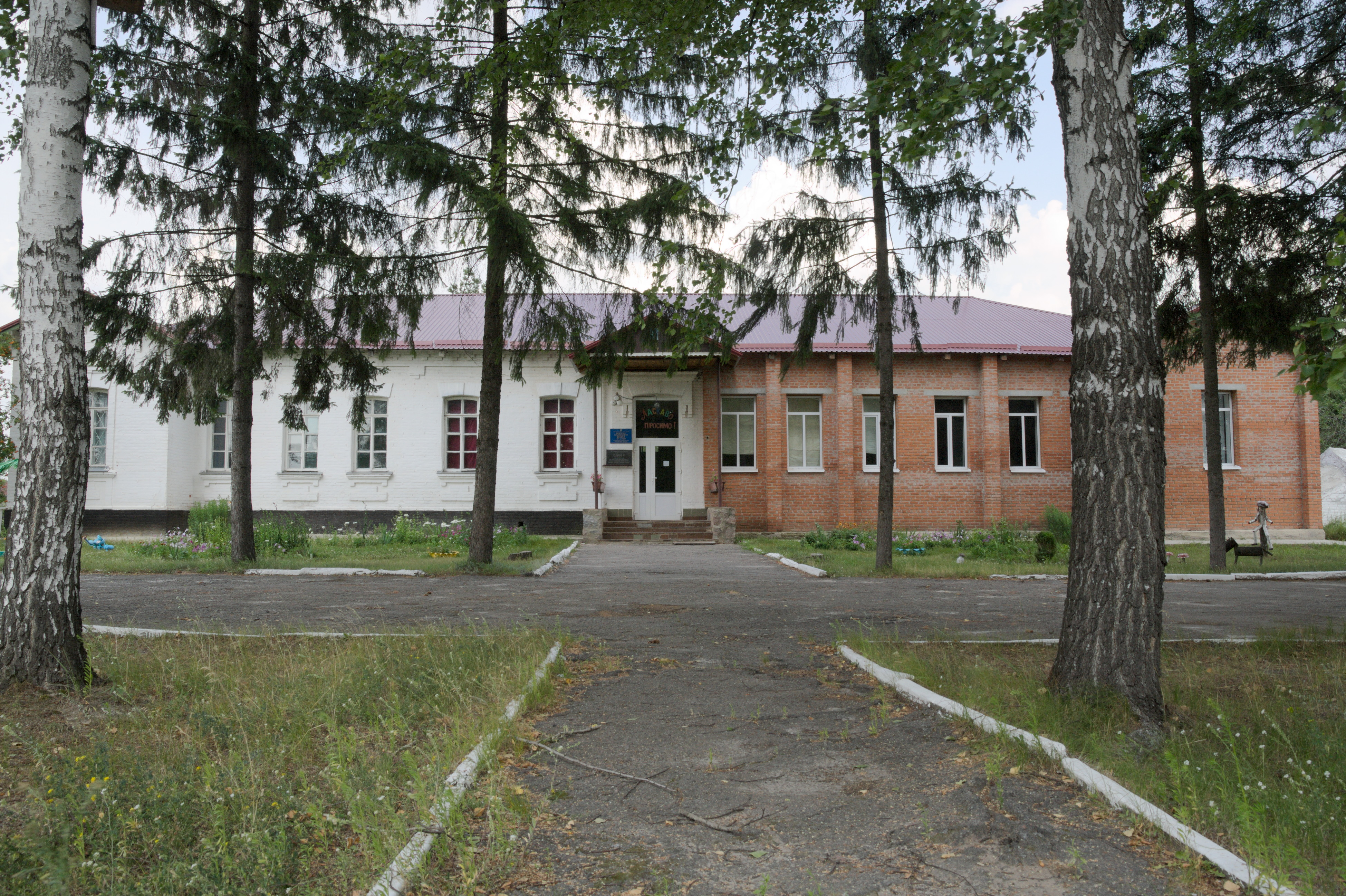 с. Деревки, будівля школи